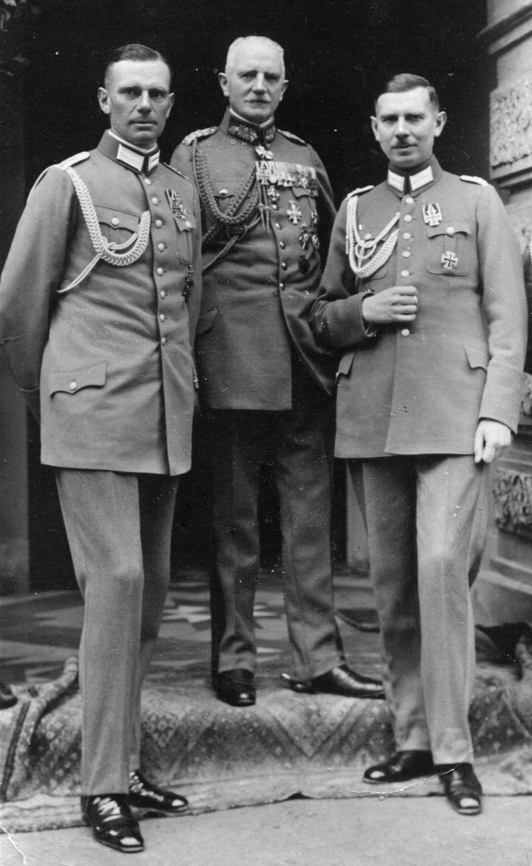 Privatfoto in der Familie: Detmold, um 1933, von links nach rechts: Uli Wintzer († 1940), Carl Wintzer (1860–1943) und Heinrich Wintzer (1892–1947)